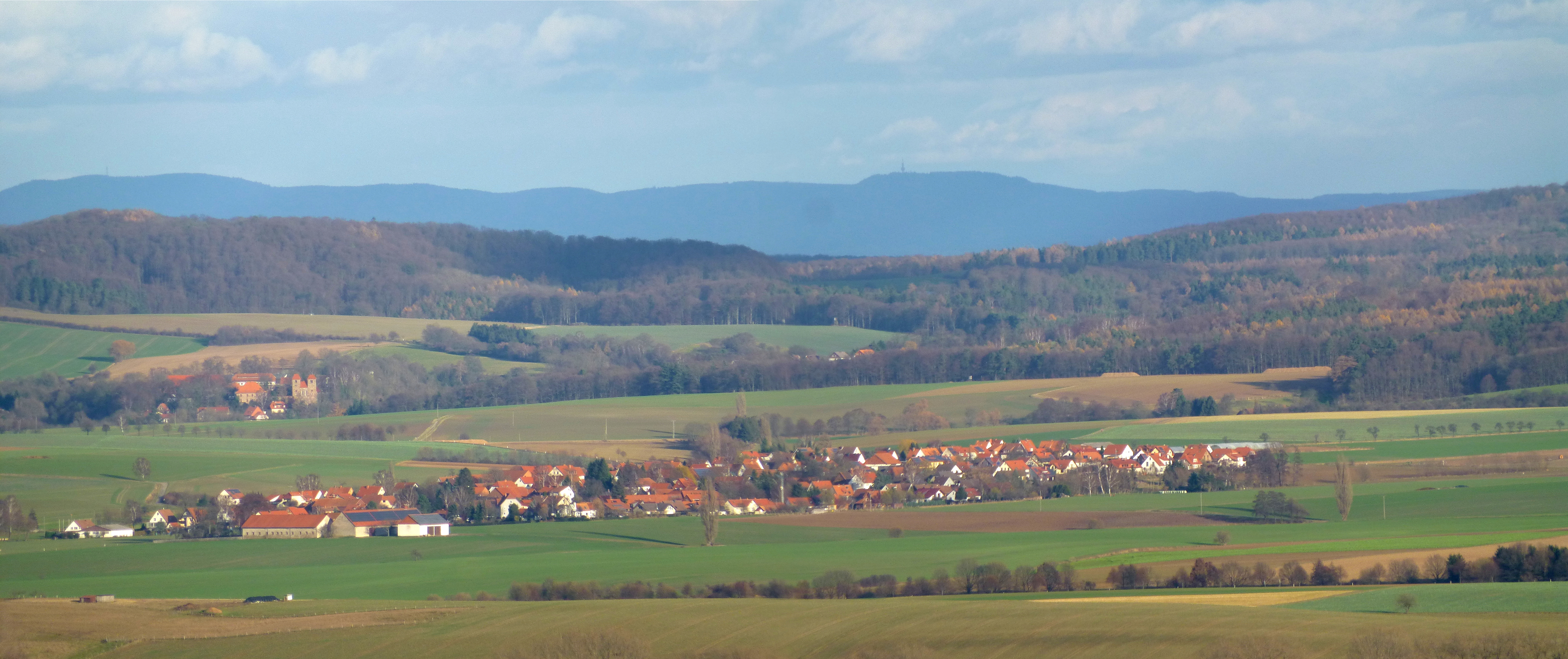 Blick vom Rieschenberg bei Deiderode auf Ballenhausen, Gemeinde Friedland, Südniedersachsen. Hinter Ballenhausen ist ein Teil von Reinhausen mit der Klosterkirche erkennbar